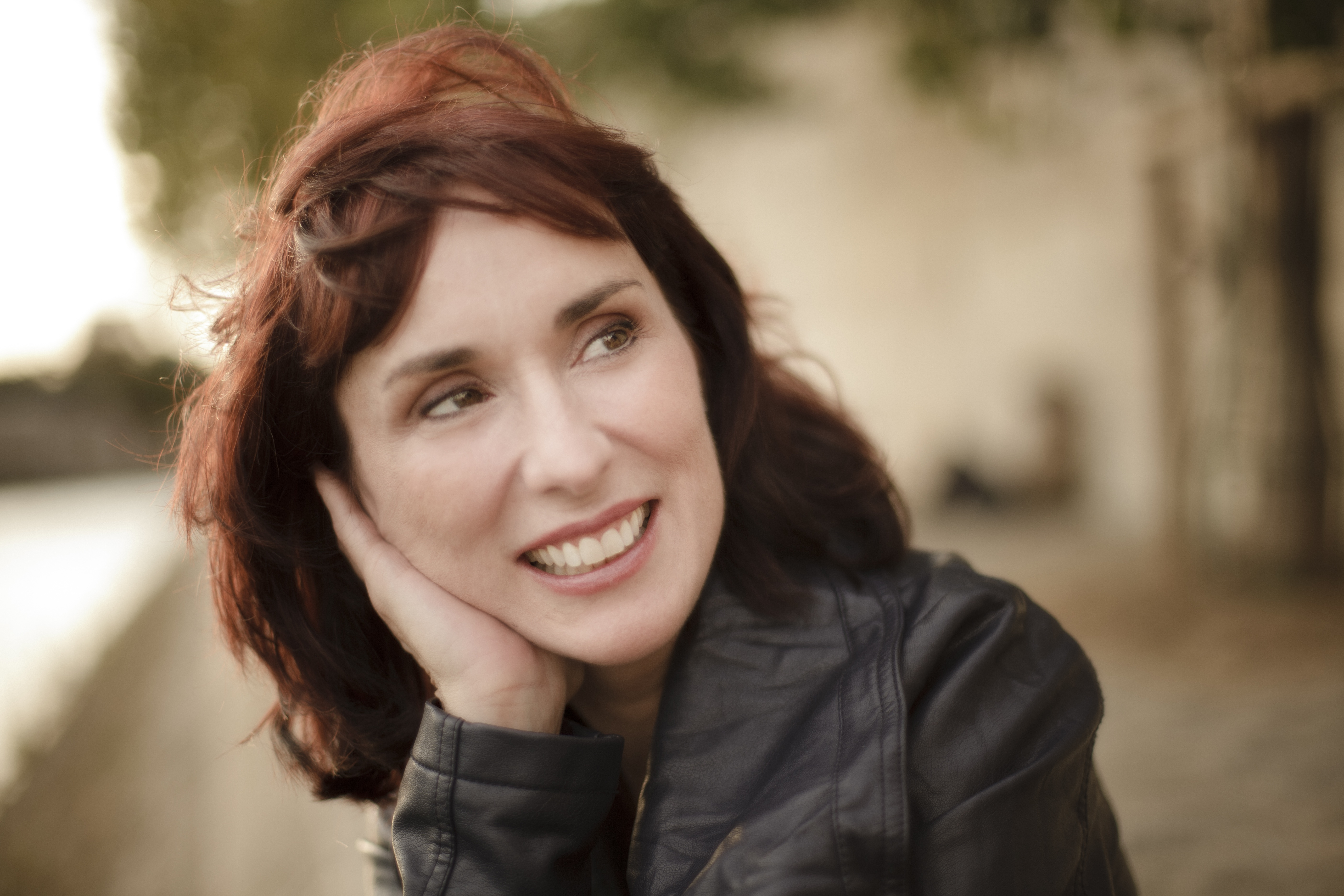 photo Geneviève Rioux